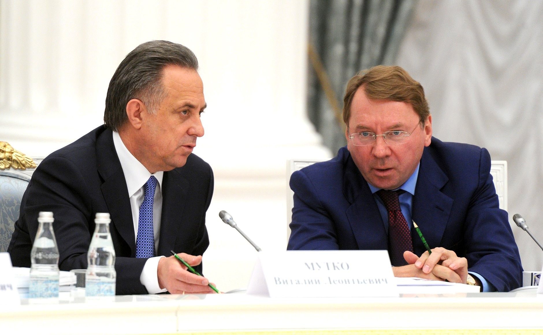 Министр спорта Виталий Мутко и помощник Президента, вице-президент Олимпийского комитета России, председатель совета президентов Ассоциации зимних олимпийских видов спорта Владимир Кожин на заседании Совета по развитию физической культуры и спорта